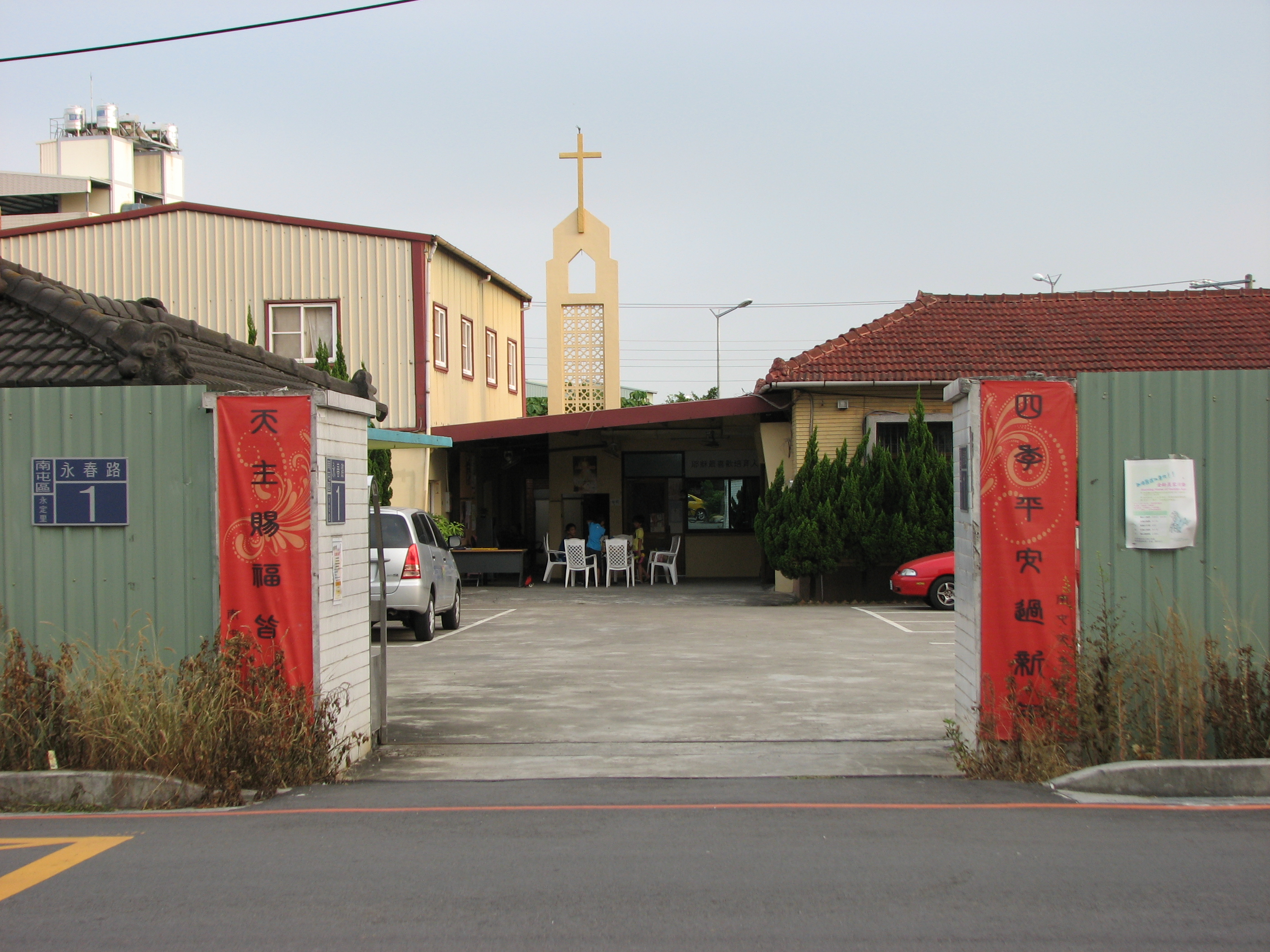 南屯聖維雅內堂（南屯天主堂），位於臺中市南屯區永春路1號。